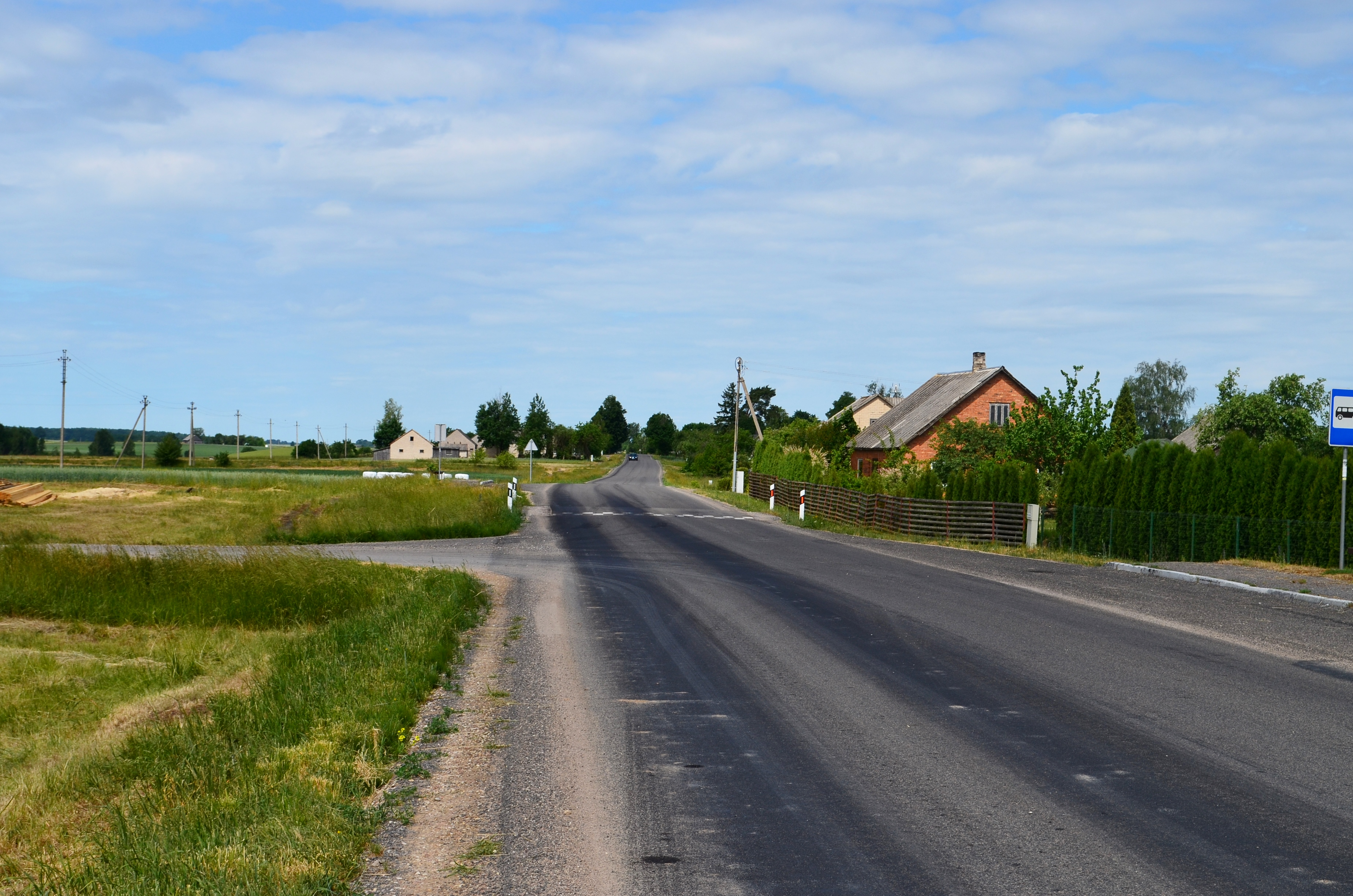 Kalesninkai, Krokialaukio sen., Alytaus raj.